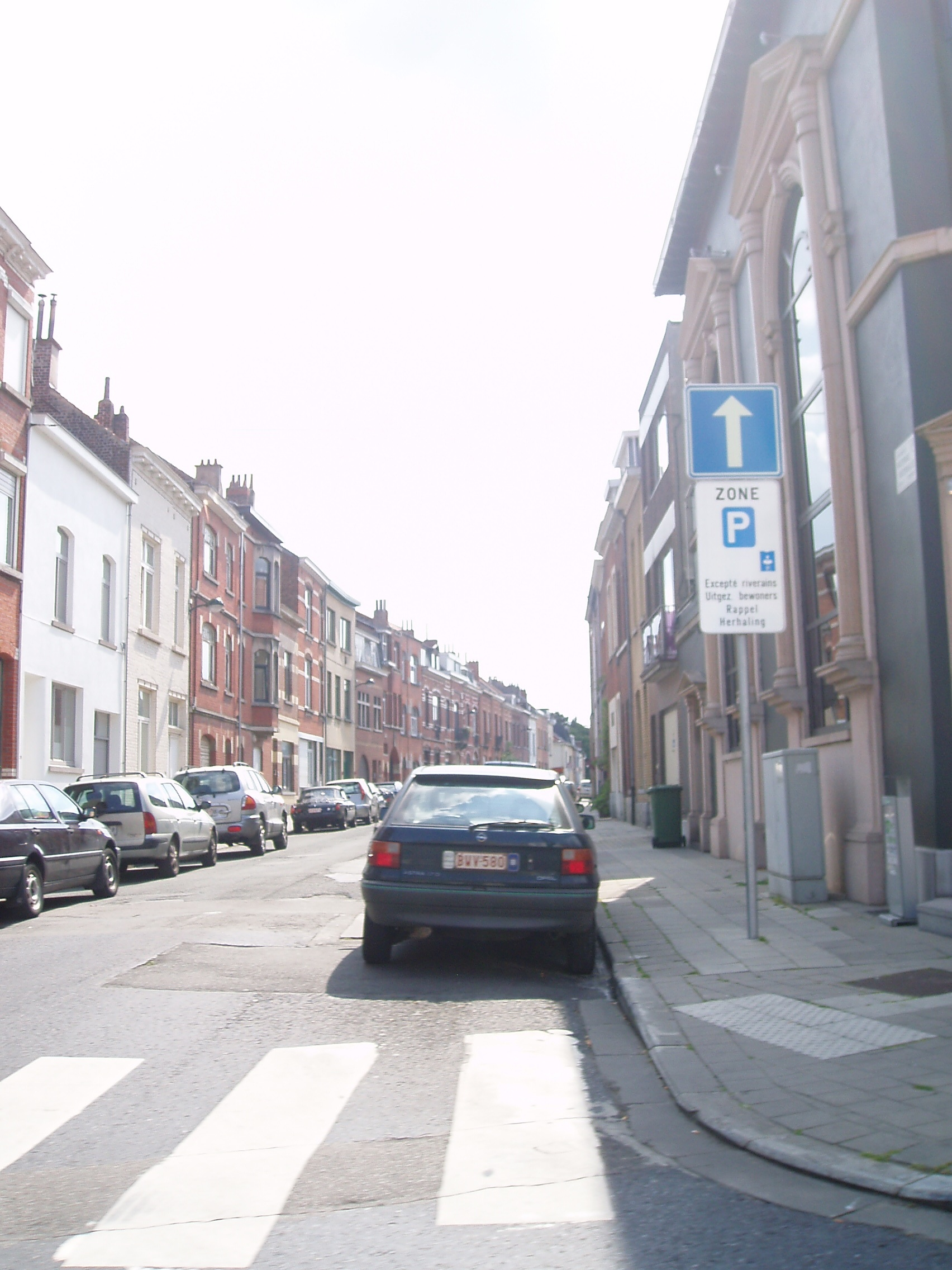 chaussée de Watermael Auderghem Belgium